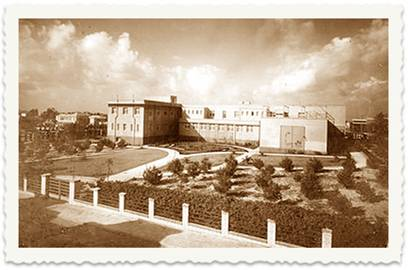 בית הבריאות ע״ש נתן ולינה שטראוס, רחוב בלפור 14 (חזית אחורית, מצולם מרחוב מזא״ה).